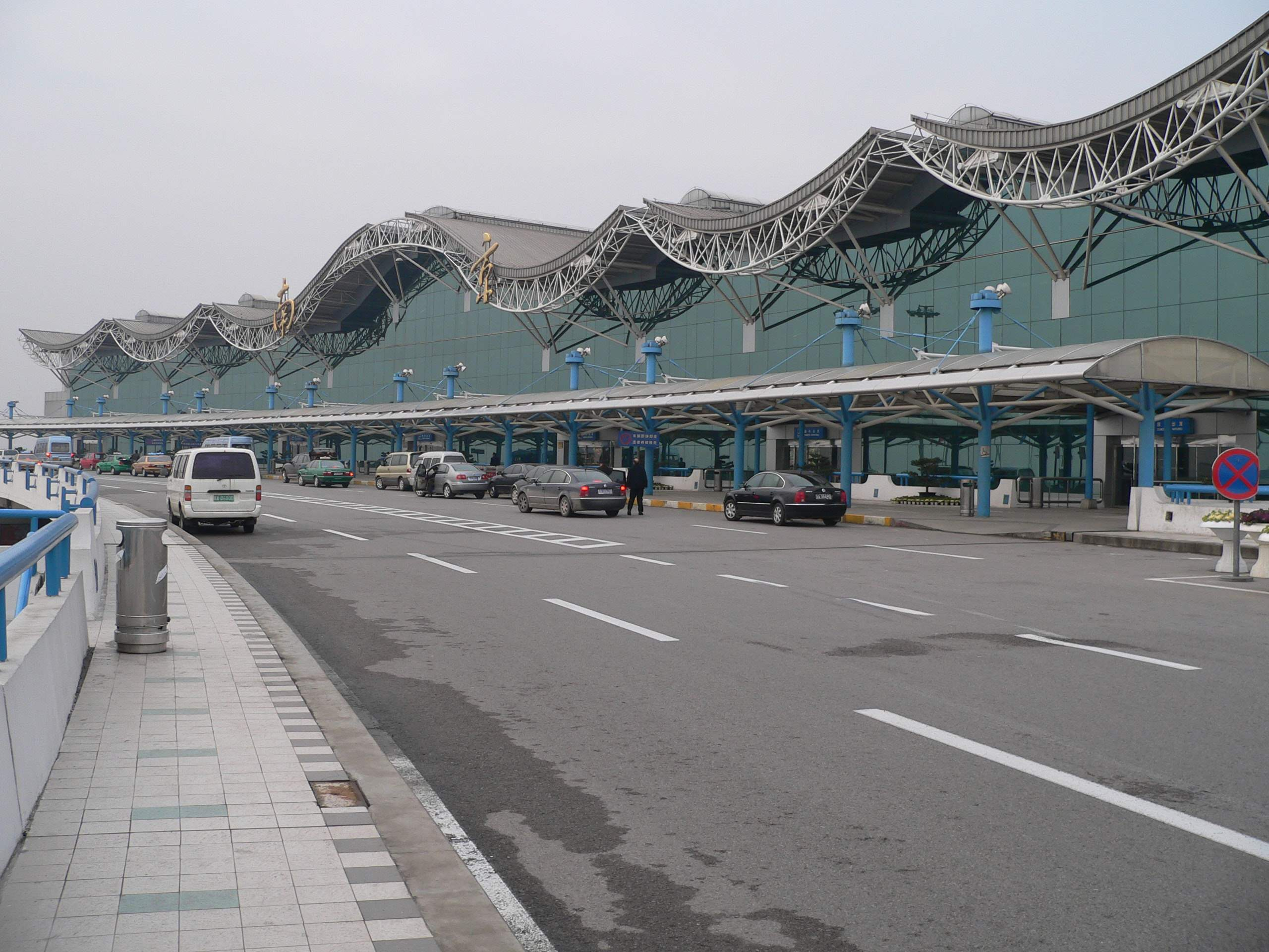 禄口机场